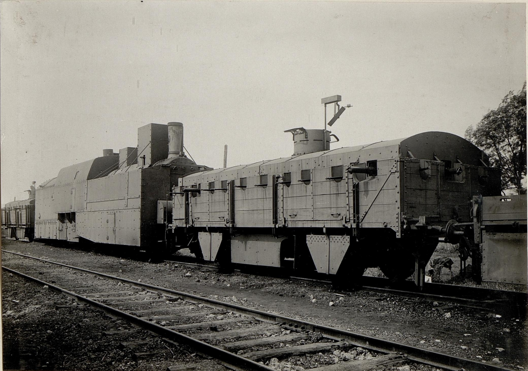 Panzerzug Hinowice